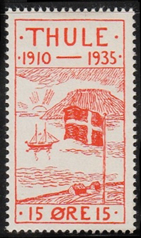 Почтовая марка Туле (Гренландия)